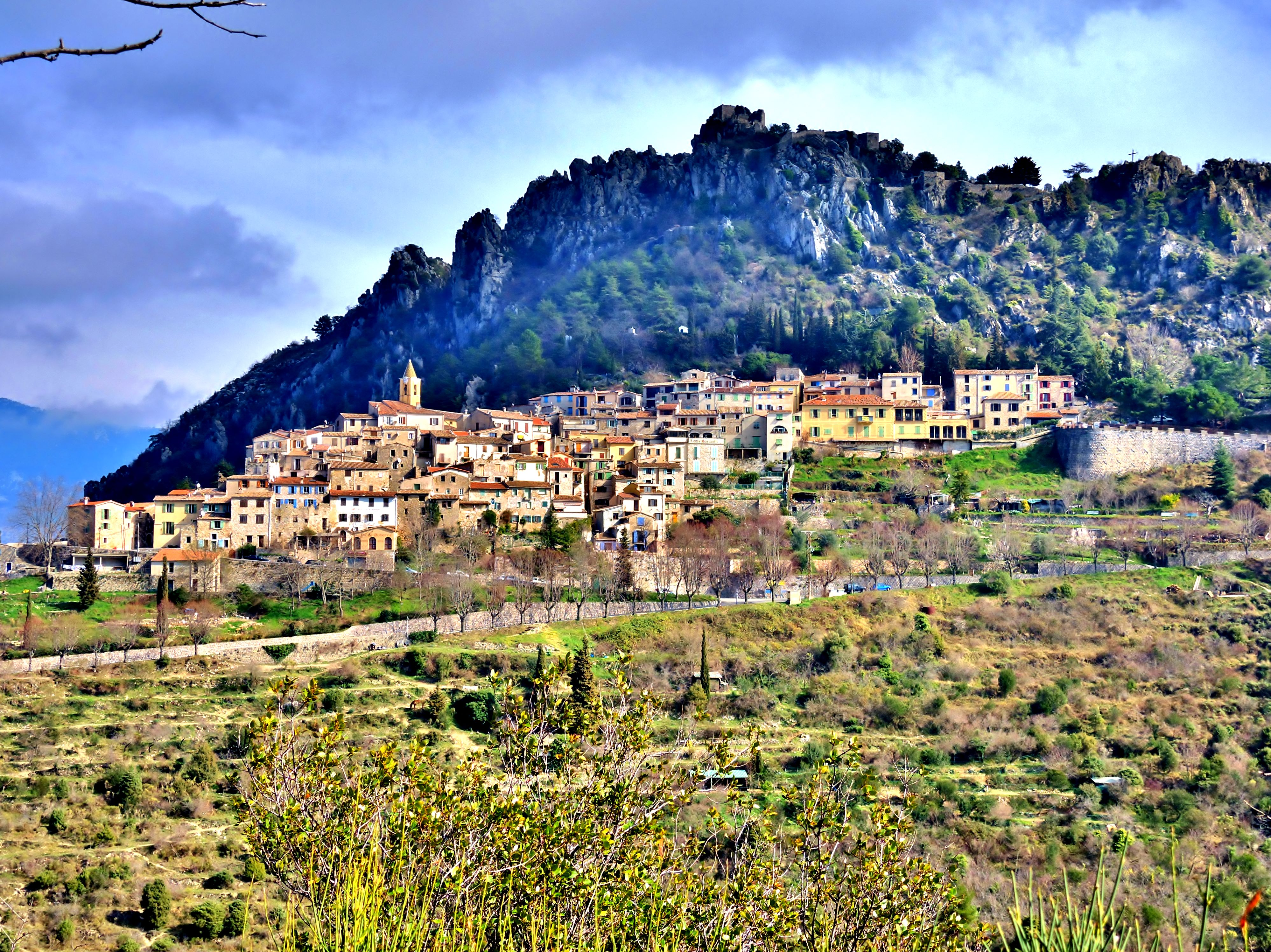 Le village vu de la route de Peille.